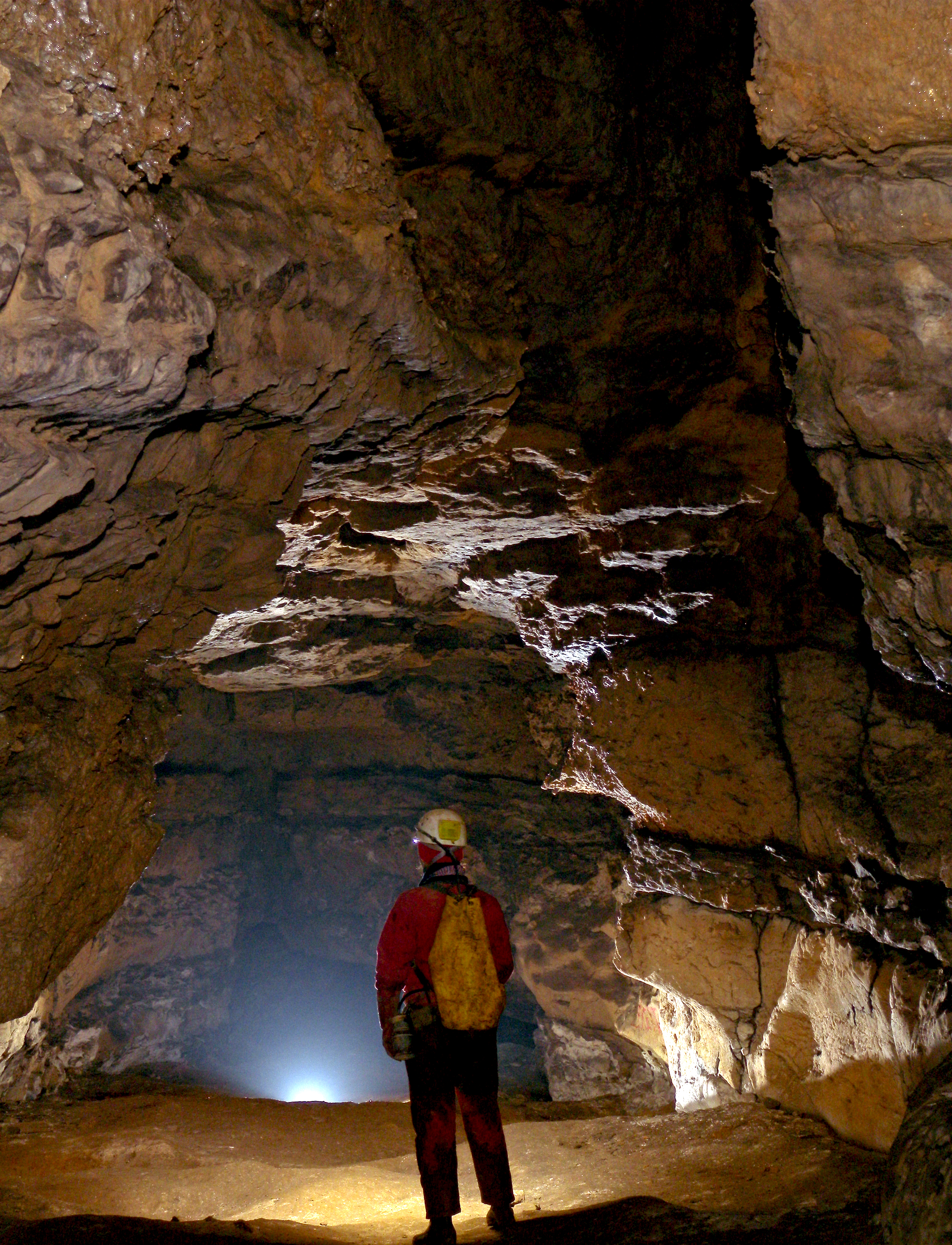 Atxurrako goiko maila, sarreratik labar-arte aztarnategiko norabidean.